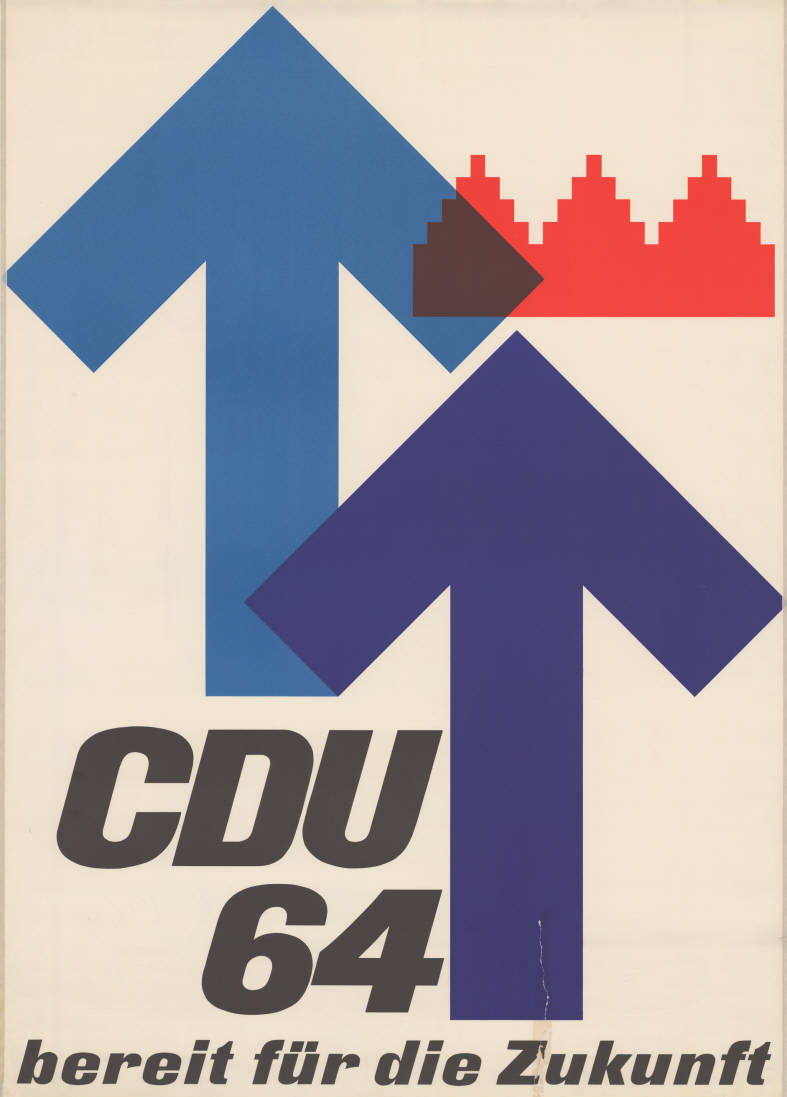 CDU 64 bereit für die Zukunft Abbildung: Rathaussymbol - Aufsteigende Pfeile Kommentar: Vgl. Plakate Nr. 10-005-250 und -252 Plakatart: Motiv-/Textplakat Objekt-Signatur: 10-005 : 251 Bestand: Plakate zu Bürgerschaftswahlen Bremen (10-005) GliederungBestand10-18: Plakate zu Bürgerschaftswahlen Bremen (10-005) » CDU Lizenz: KAS/ACDP 10-005 : 251 CC-BY-SA 3.0 DE